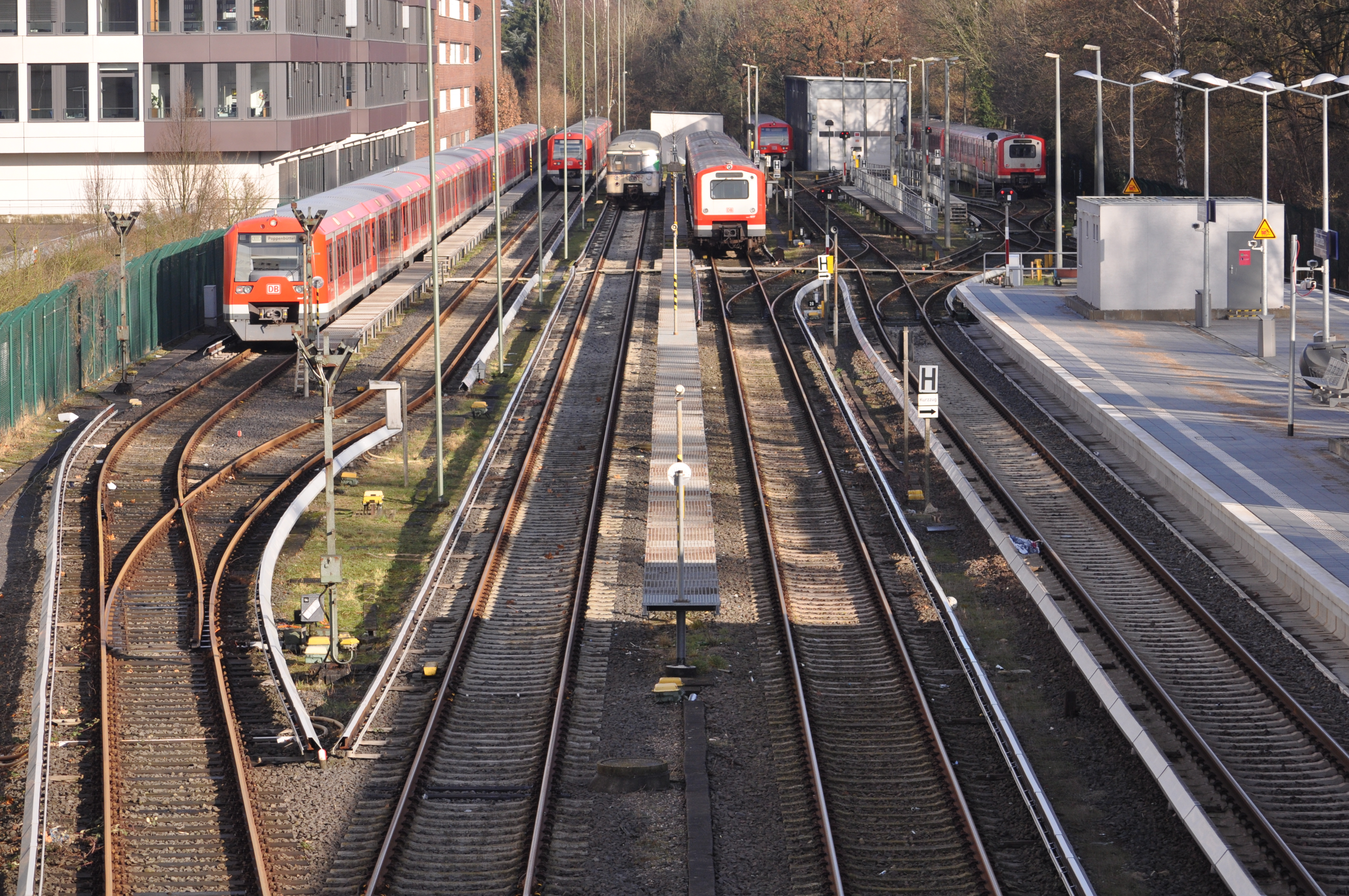 Abstellgleise an der S-Bahn-Station Hamburg-Poppenbüttel.